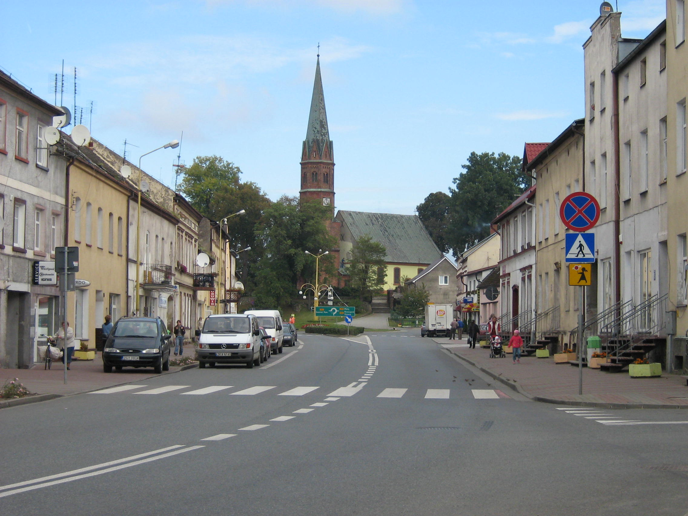 Golczewo, ul. Zwycięstwa